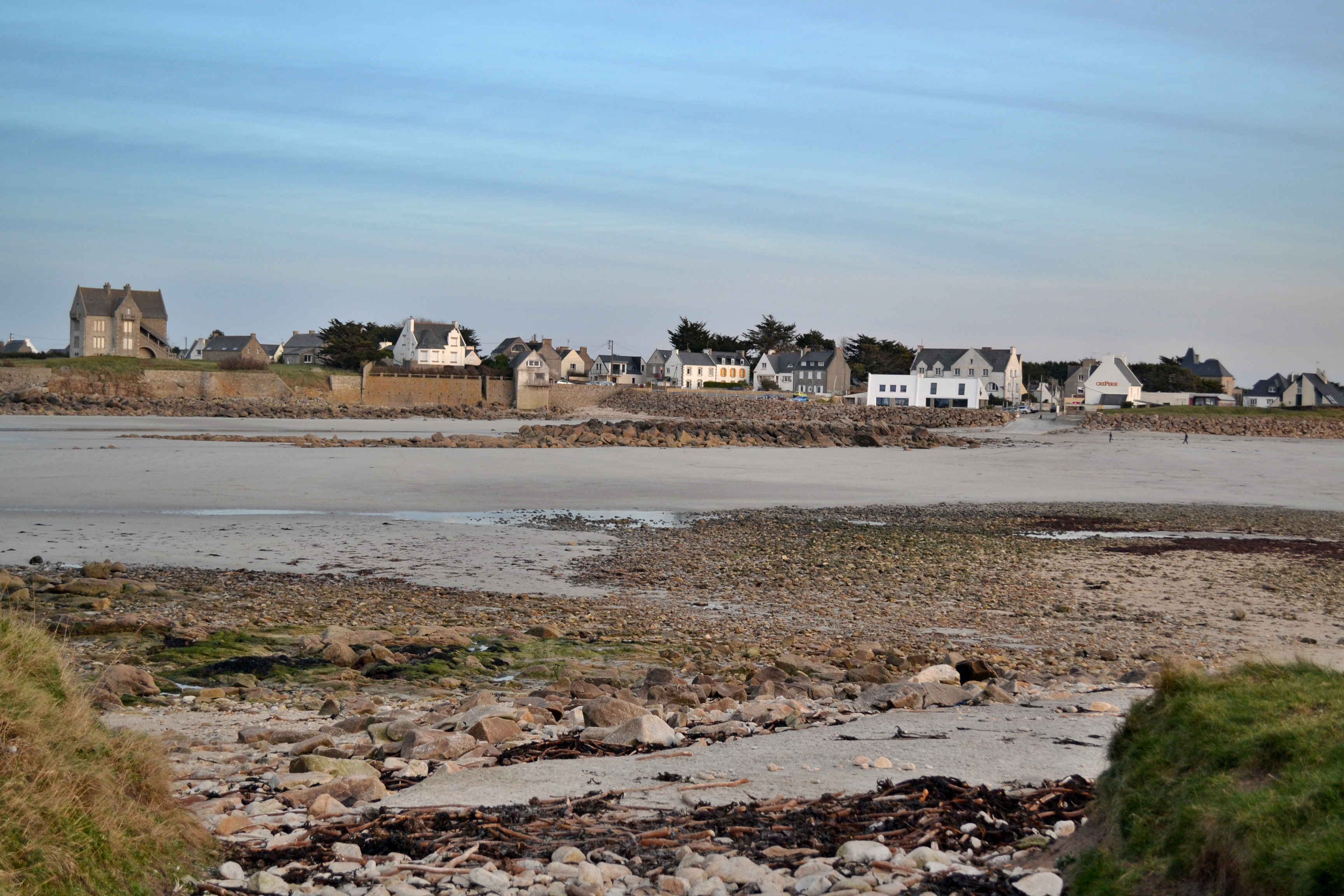 Couché de soleil sur la plage du Dossen à Santec, nord Finistère.